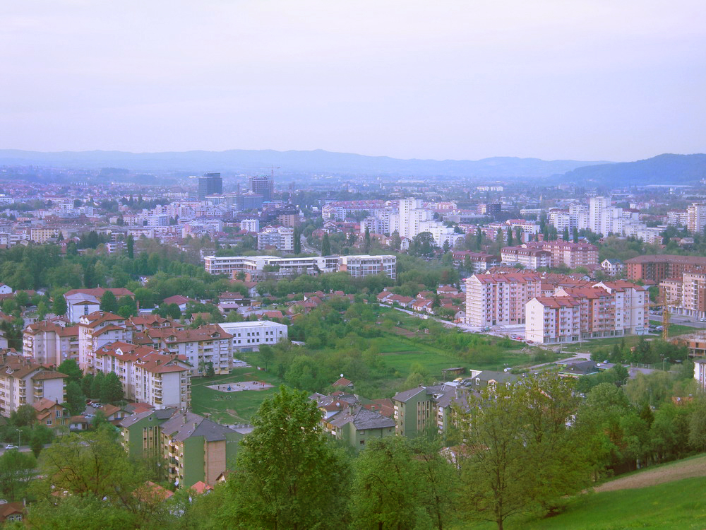 Banja Luka